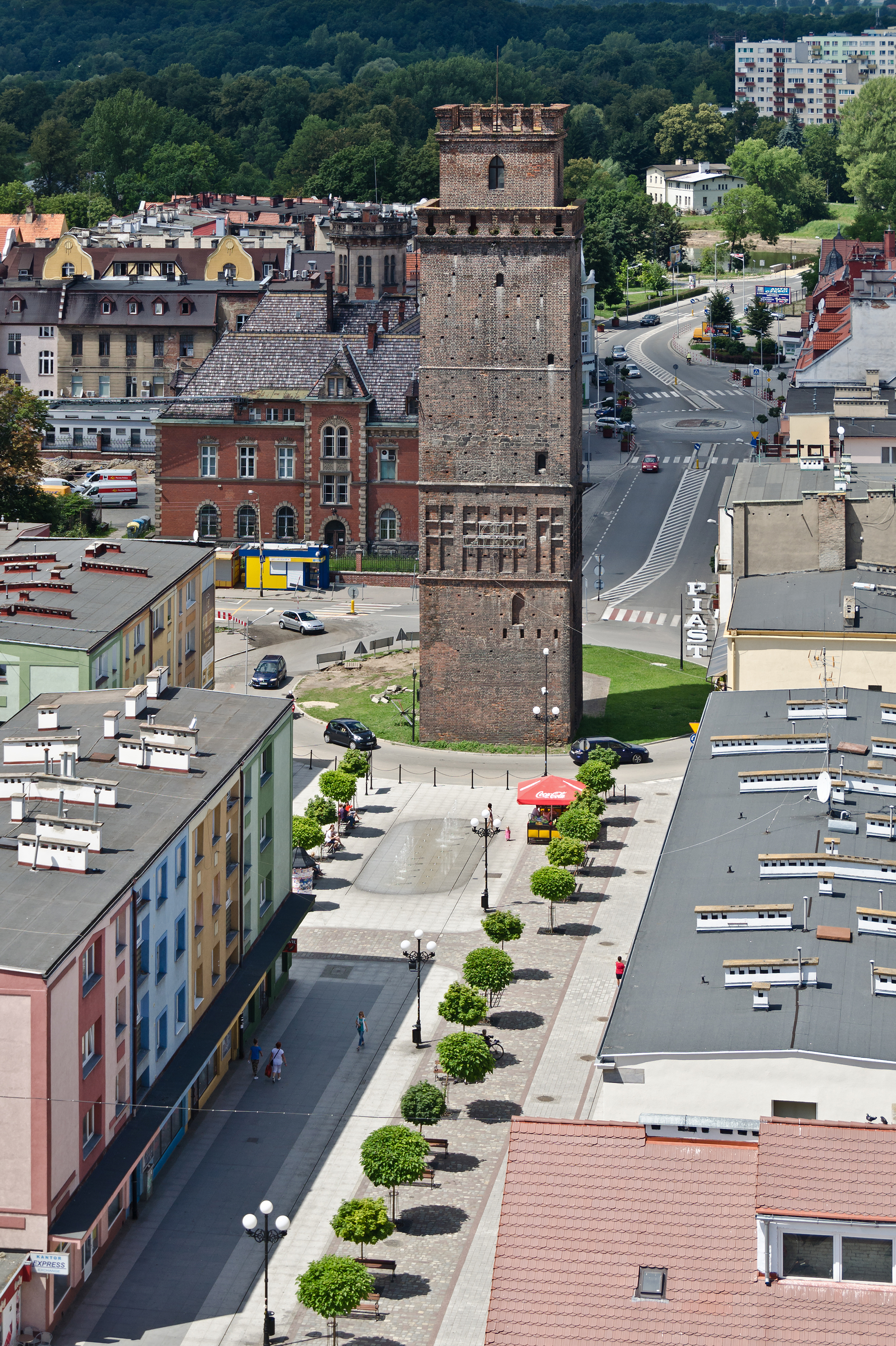 Nysa, Brama Ziębicka, 1350, XVI